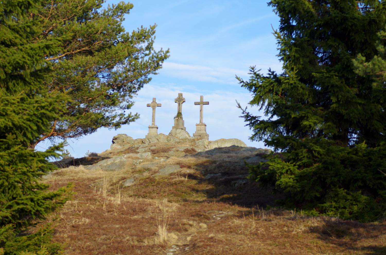 Slavkovský les Prameny Tři kříže; více